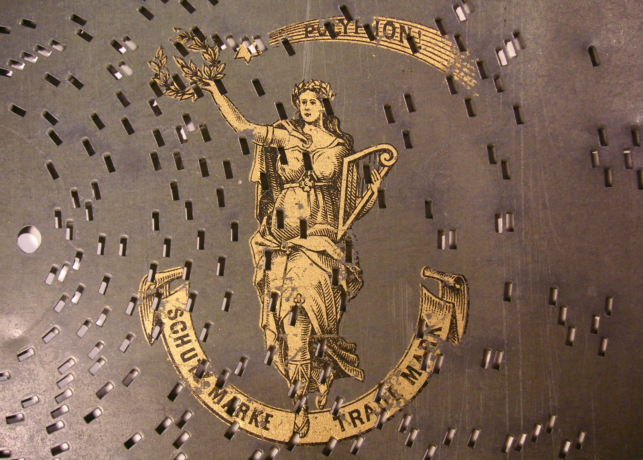 Schutzmarke der Firma Polyphon-Musikwerke AG auf einer Polyphon Lochplatte